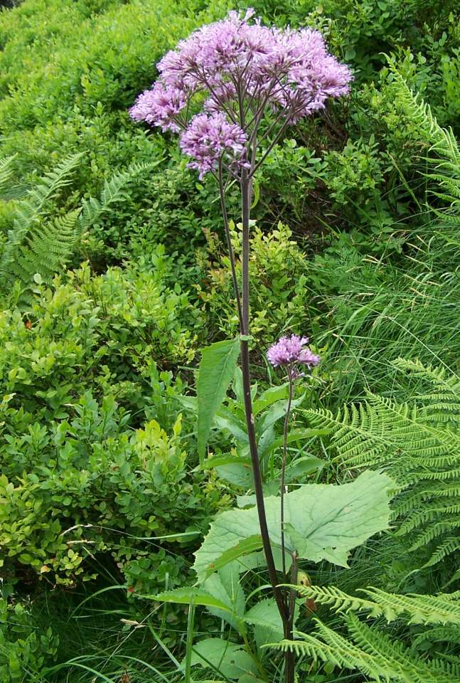 Adenostyles alliariae (pl. miłosna górska)